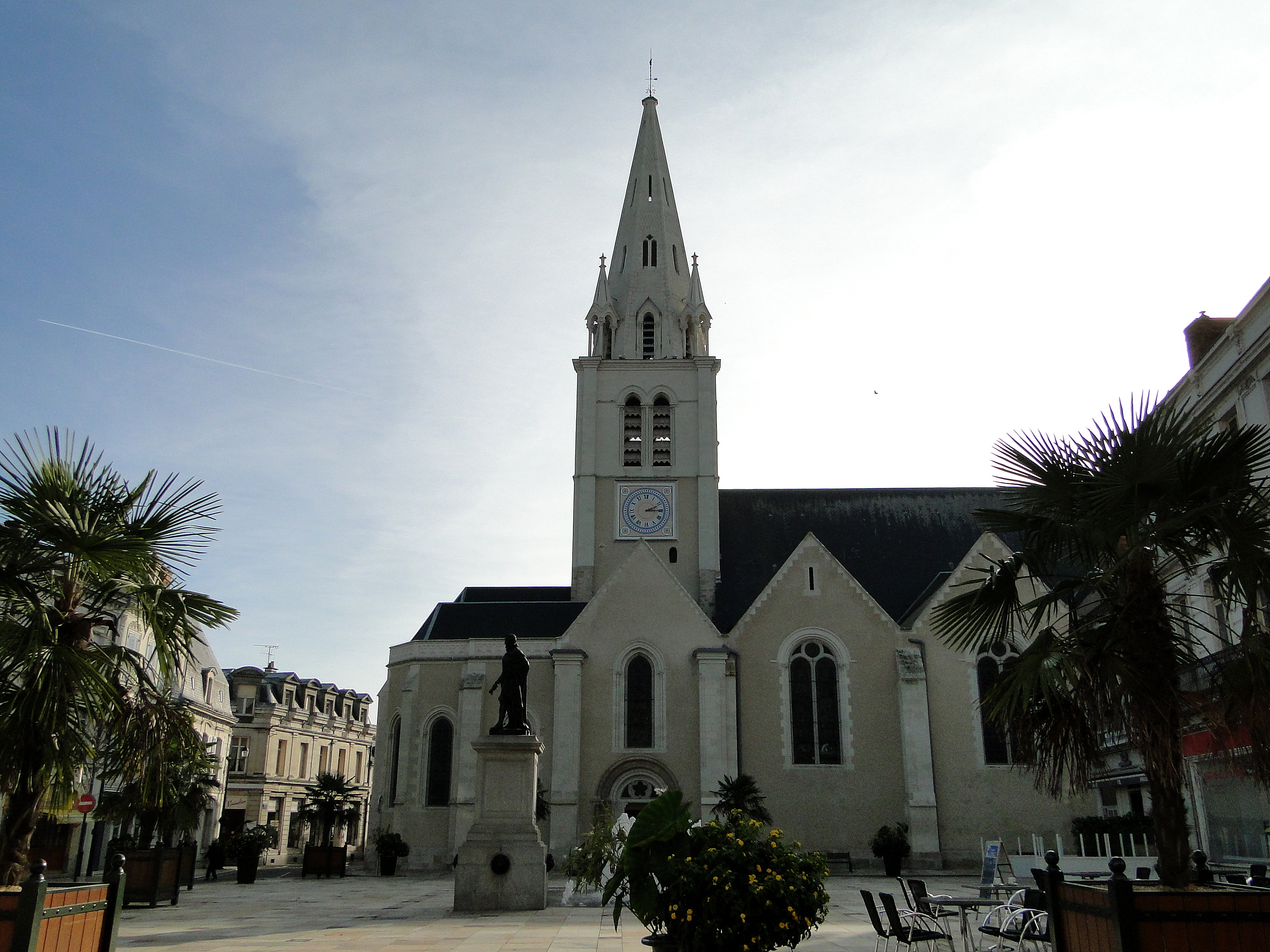 Eglise Saint-Thomas de la Flèche (Sarthe)